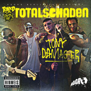 Cover der Single „Totalschaden“